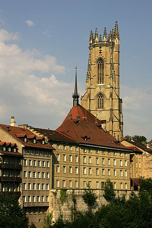 Fribourg / Freiburg: Kathedrale Sankt Nicolas